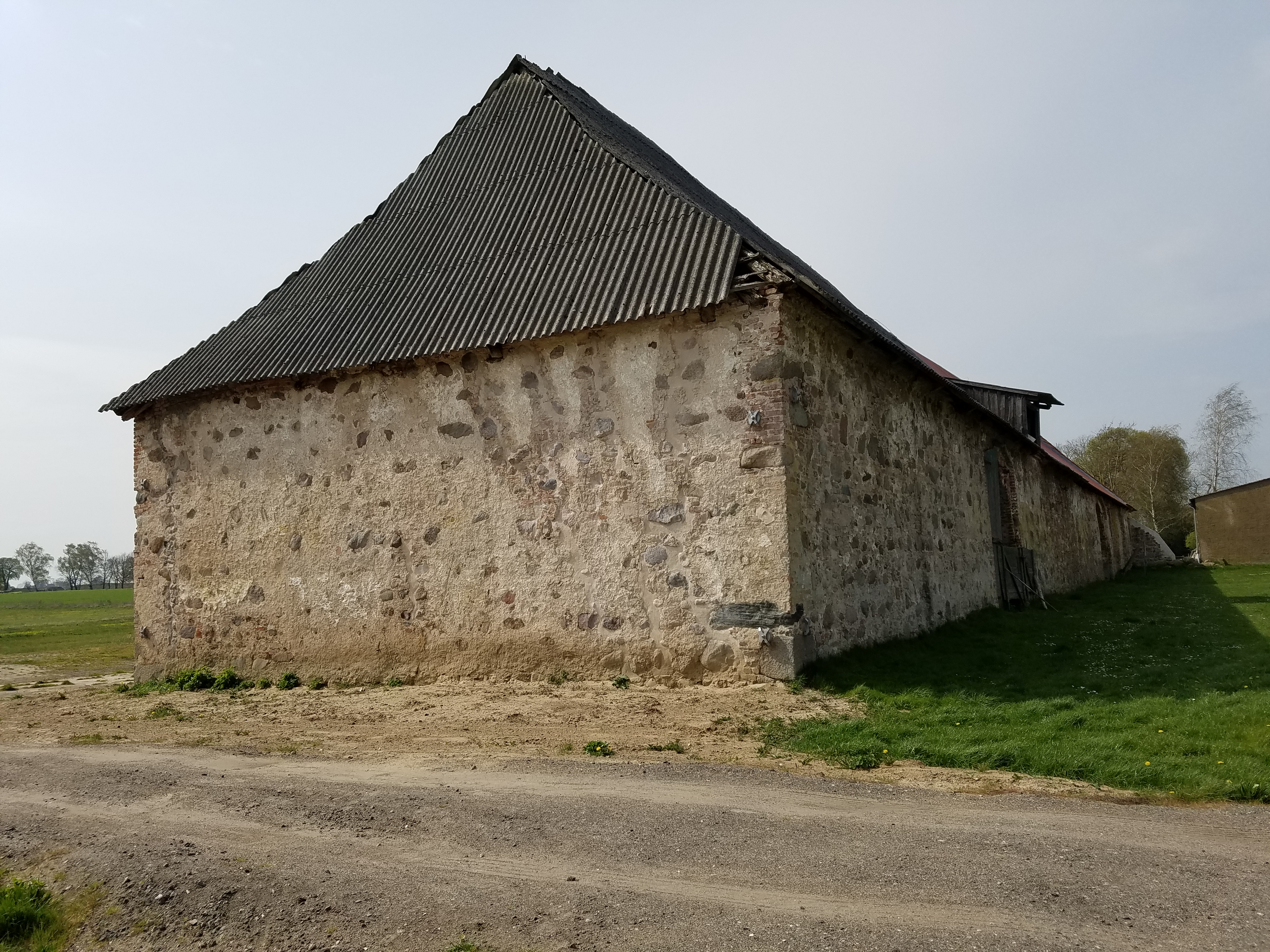 Feldsteinscheune, Schloss Wrangelsburg, Landkreis Vorpommern-Greifswald (Deutschland)